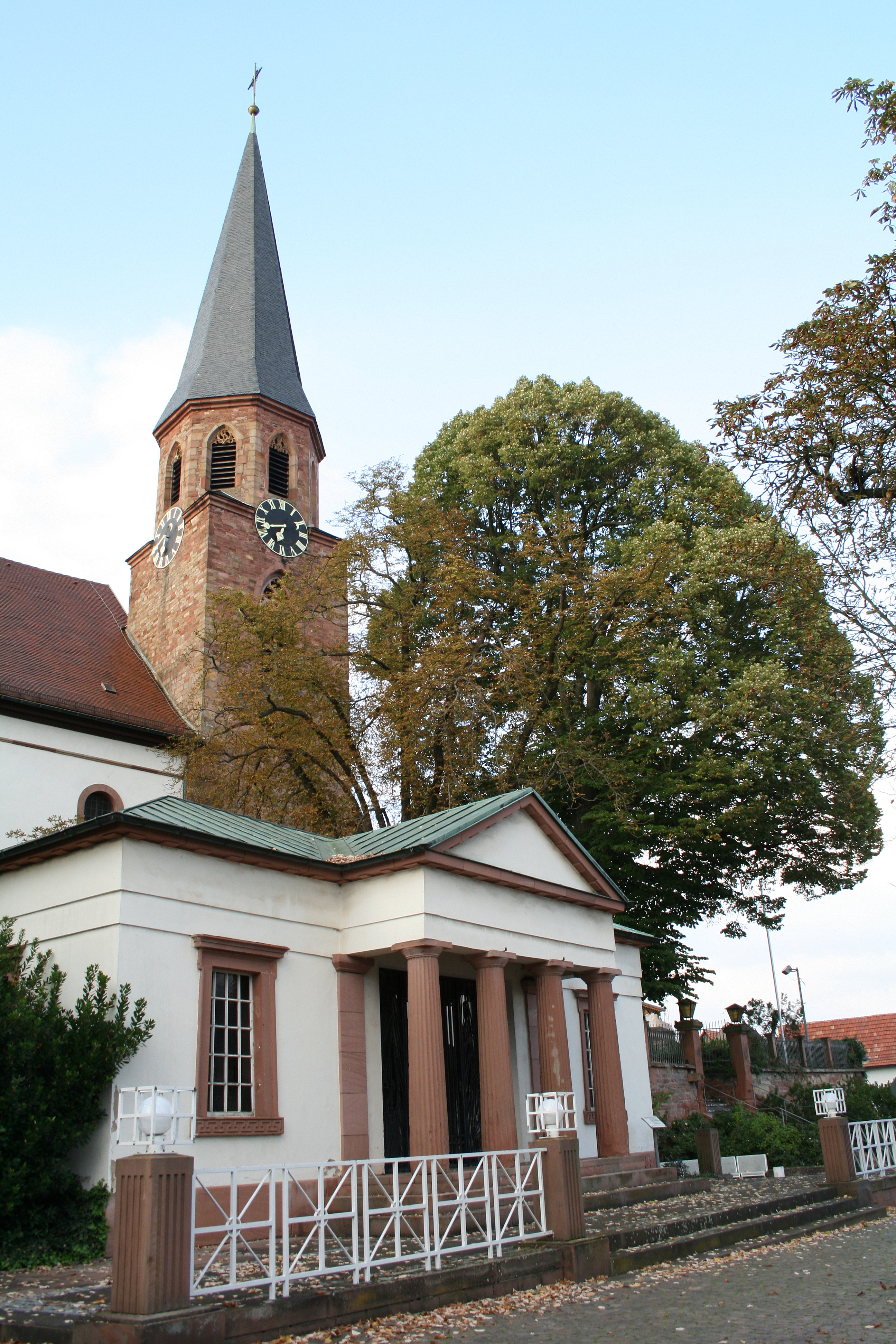 Kriegergedächtniskapelle, ehemaliges Wachthaus, 1830, Architekt Leo von Klenze; klassizistischer Walmdachbau mit Portikus; Kreuzigungsgruppe, Holz, Assistenzfiguren spätgotisch